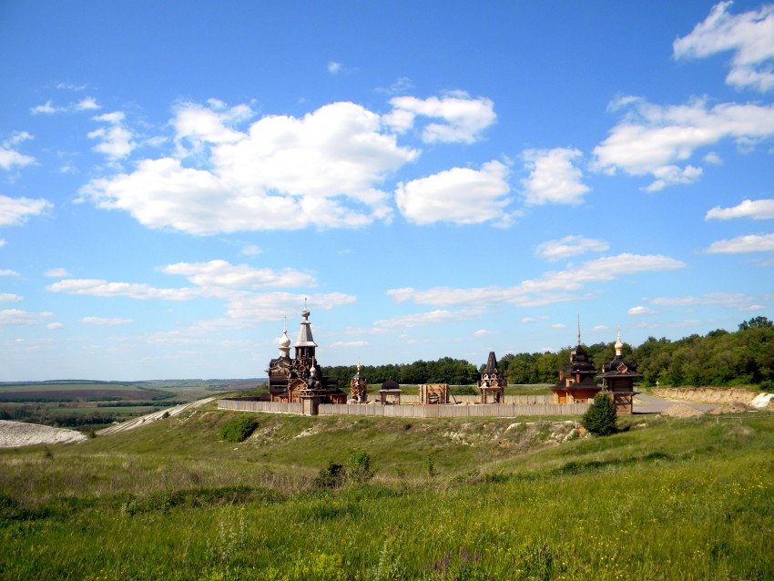 Воскресенский монастырь «Новый Иерусалим». Белгородская область, Валуйский район, село Сухарево.